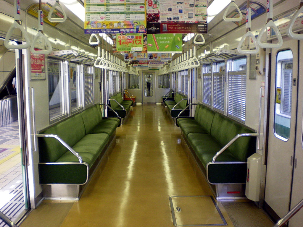 2000形車内（更新前）